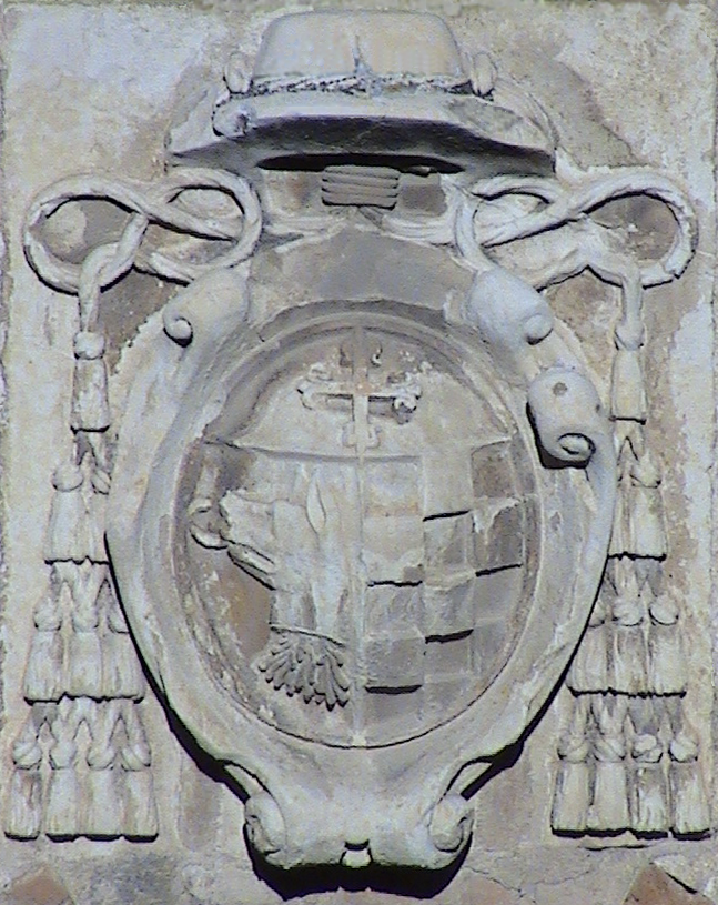 Escudo en piedra del obispo Juan Alonso de Moscoso López en el Colegio de Málaga de la Universidad de Alcalá (España) de principios del siglo XVII.